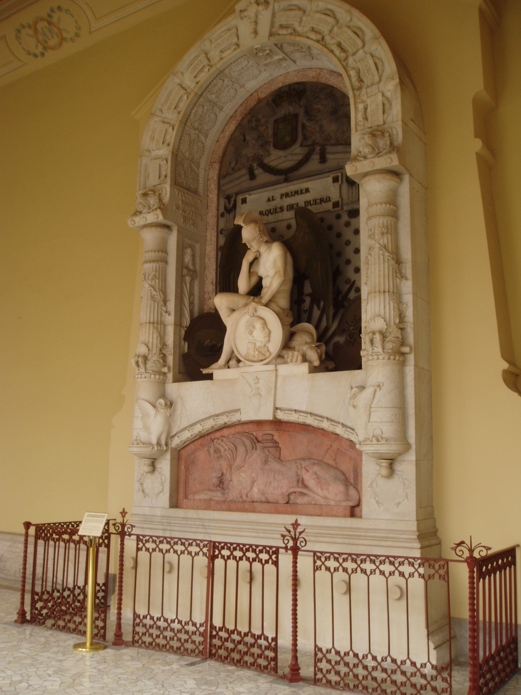 Manuel Gutiérrez de la Concha. Panteón de Hombres Ilustres. Madrid. España.